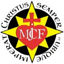 insigne du MJCF